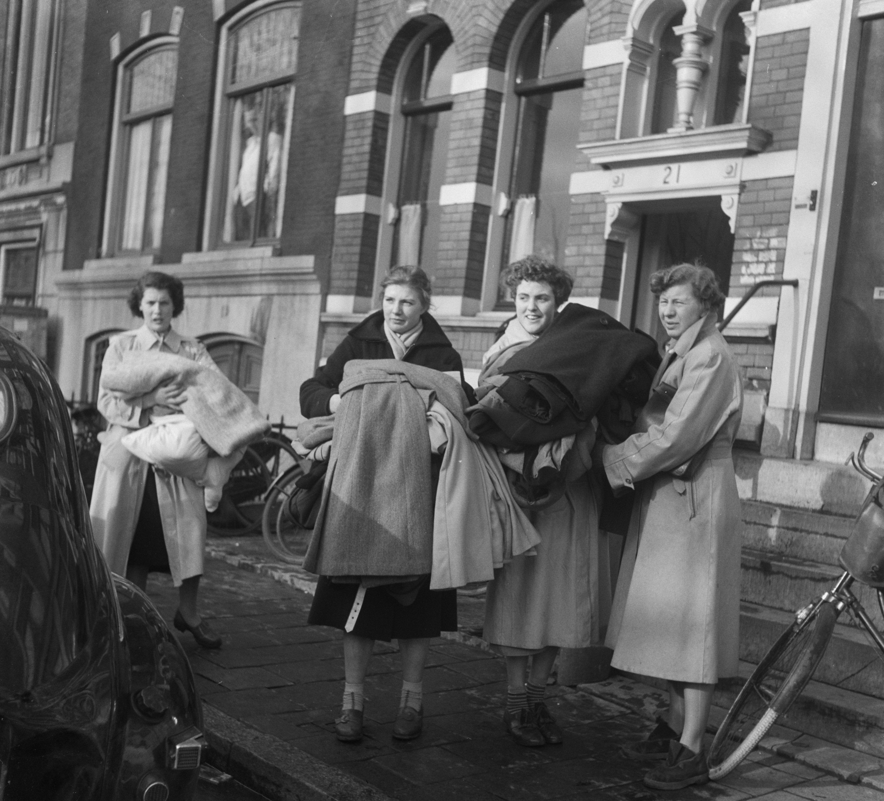 Collectie / Archief : Fotocollectie Anefo Reportage / Serie : [ onbekend ] Beschrijving : Goedereninlevering bij UVV Amsterdam Datum : 2 februari 1953 Locatie : Amsterdam, Noord-Holland Instellingsnaam : UVV Fotograaf : Behrens, Herbert / Anefo Auteursrechthebbende : Nationaal Archief Materiaalsoort : Negatief (zwart/wit) Nummer archiefinventaris : bekijk toegang 2.24.01.03 Bestanddeelnummer : 905-5143